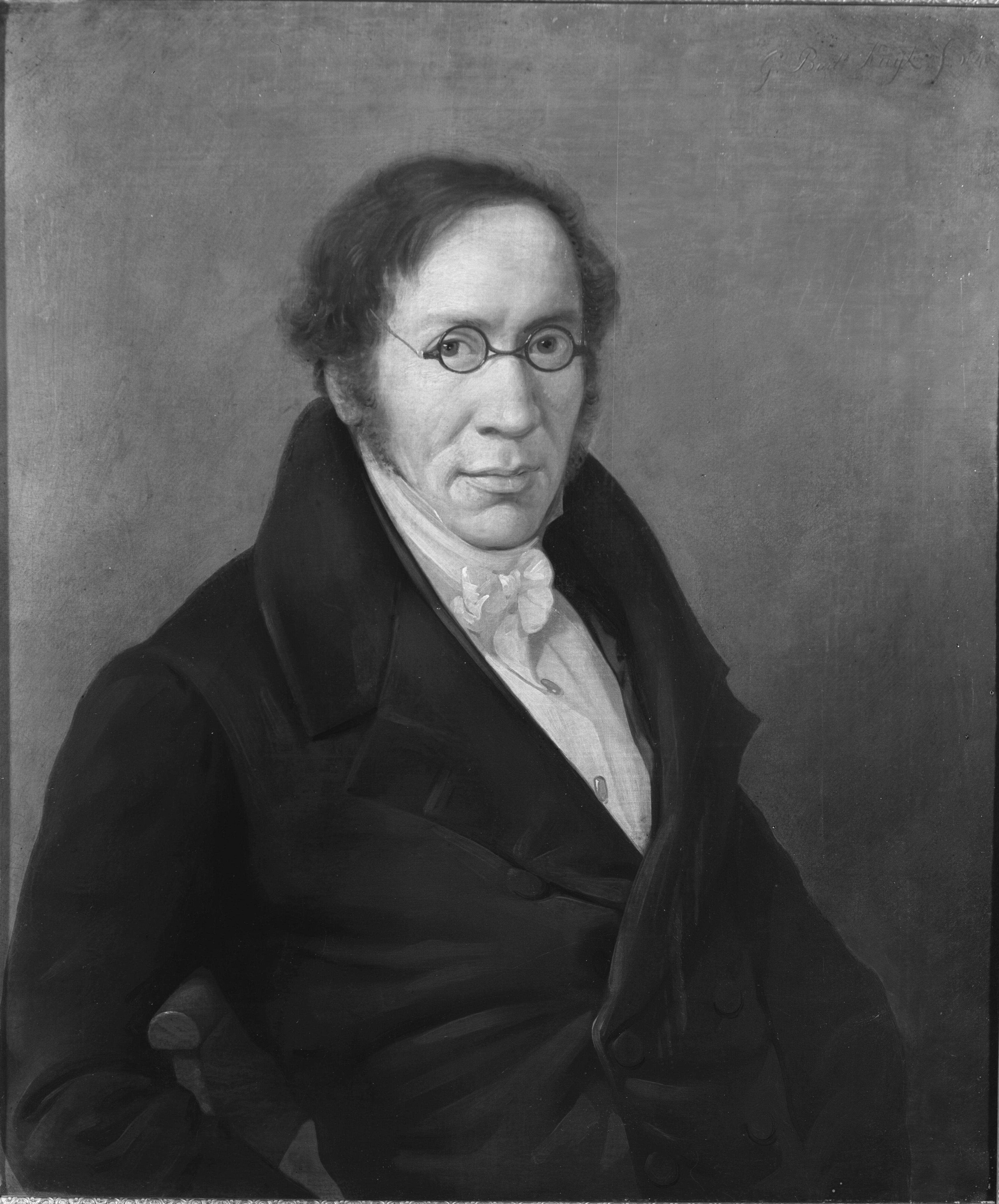 uitsnede van een portret van Isaac Anne Nijhoff (1795-1863)